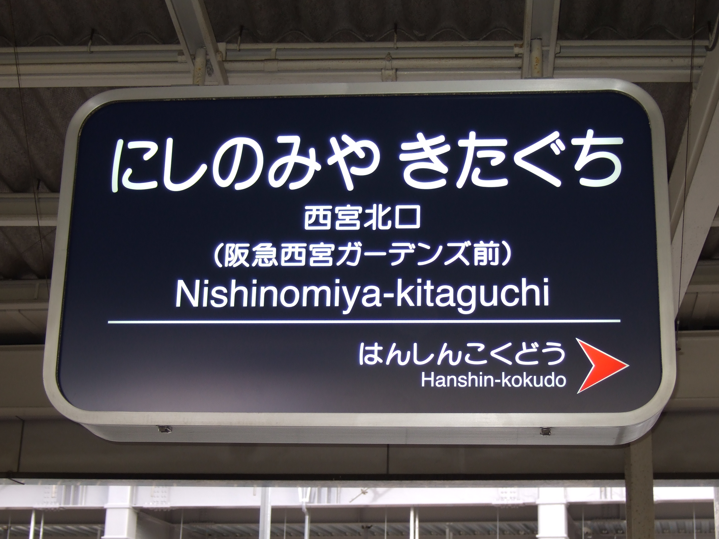 新しくなった西宮北口駅の駅名標。